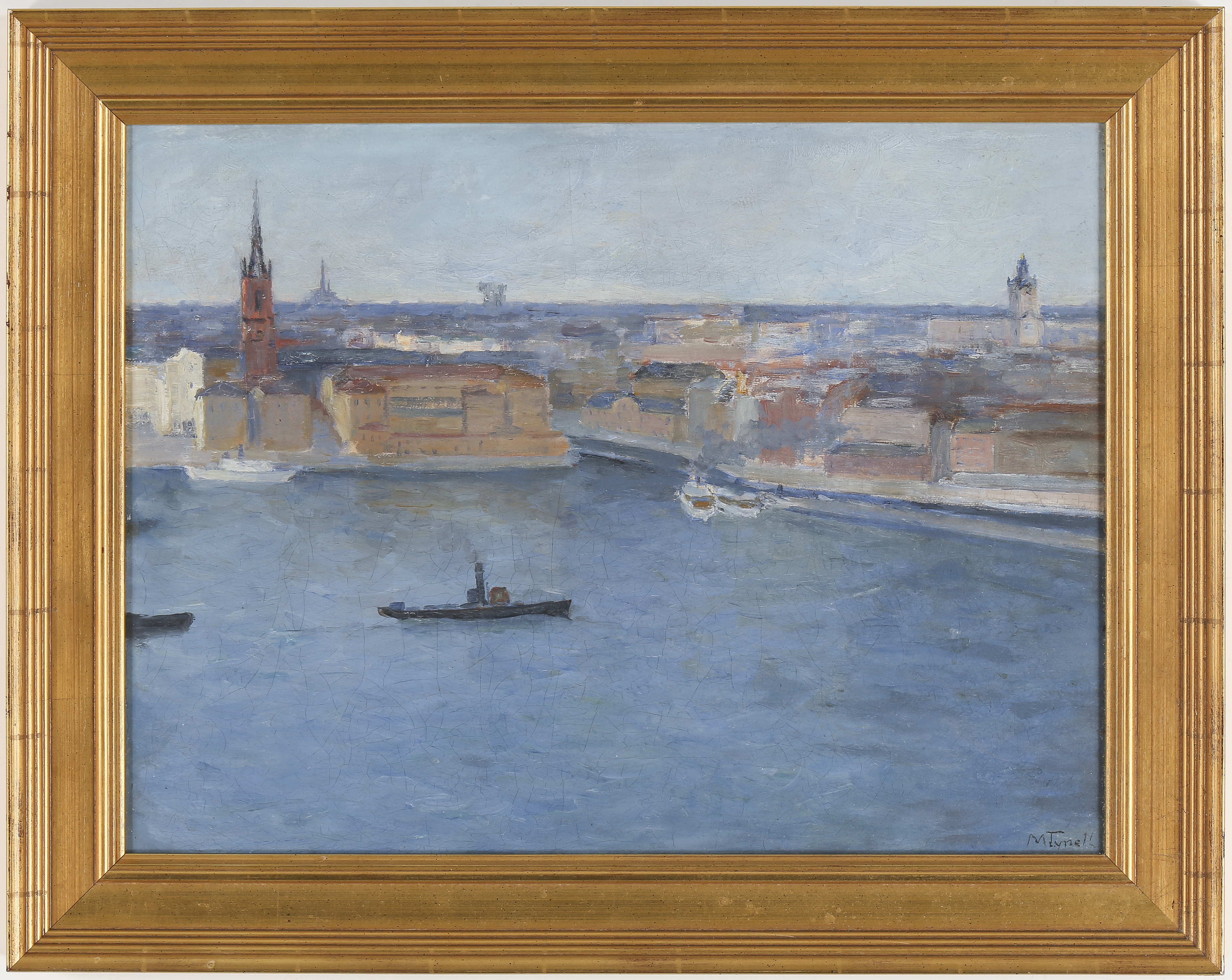 Märtha Tynell, Vy över Stockholm. 34,5 x 45 cm. Olja på pannå.